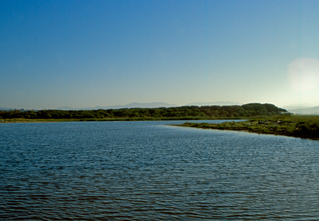 Riserva naturale Foce del Fiume Platani, Sicily